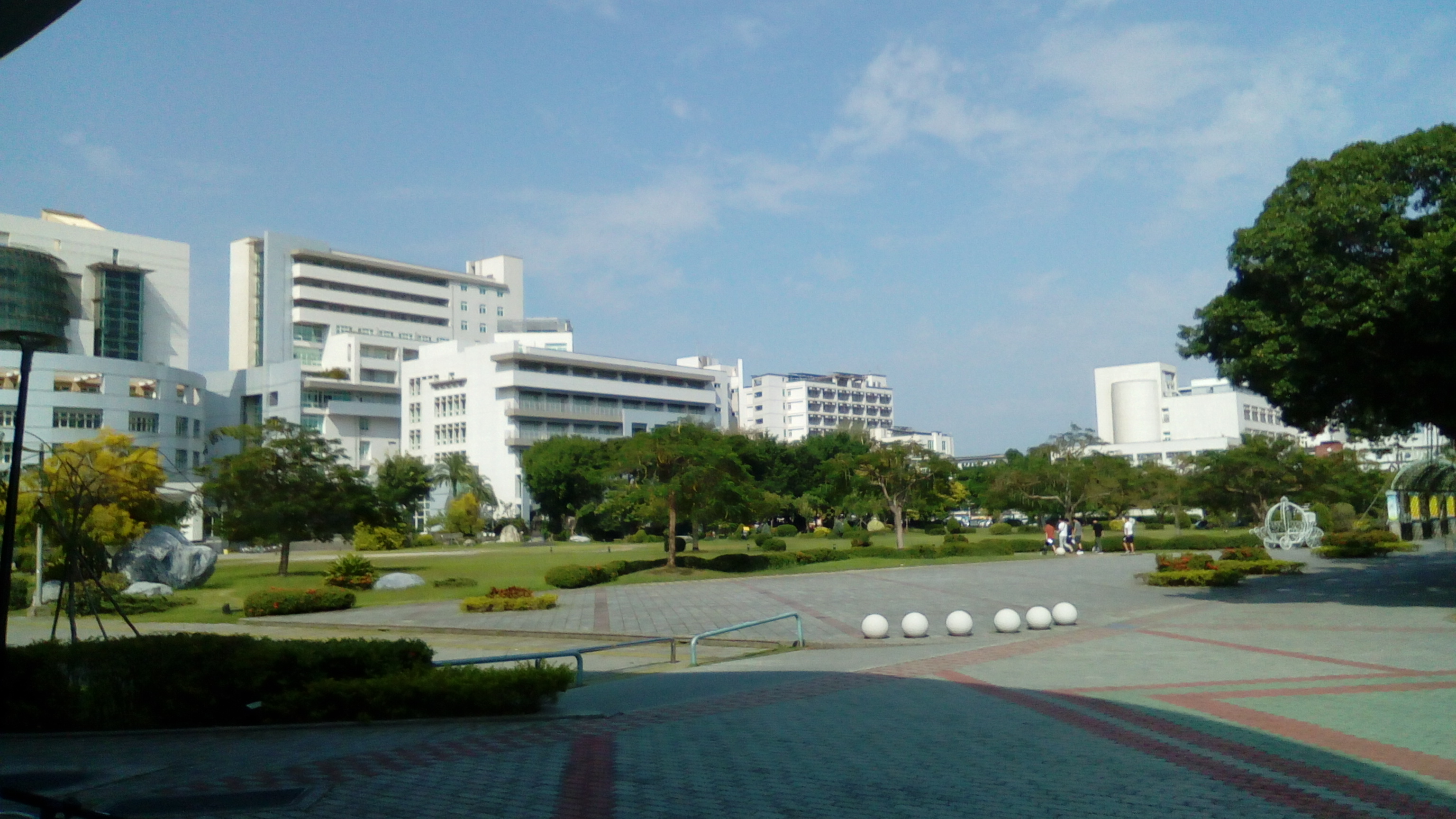 同上